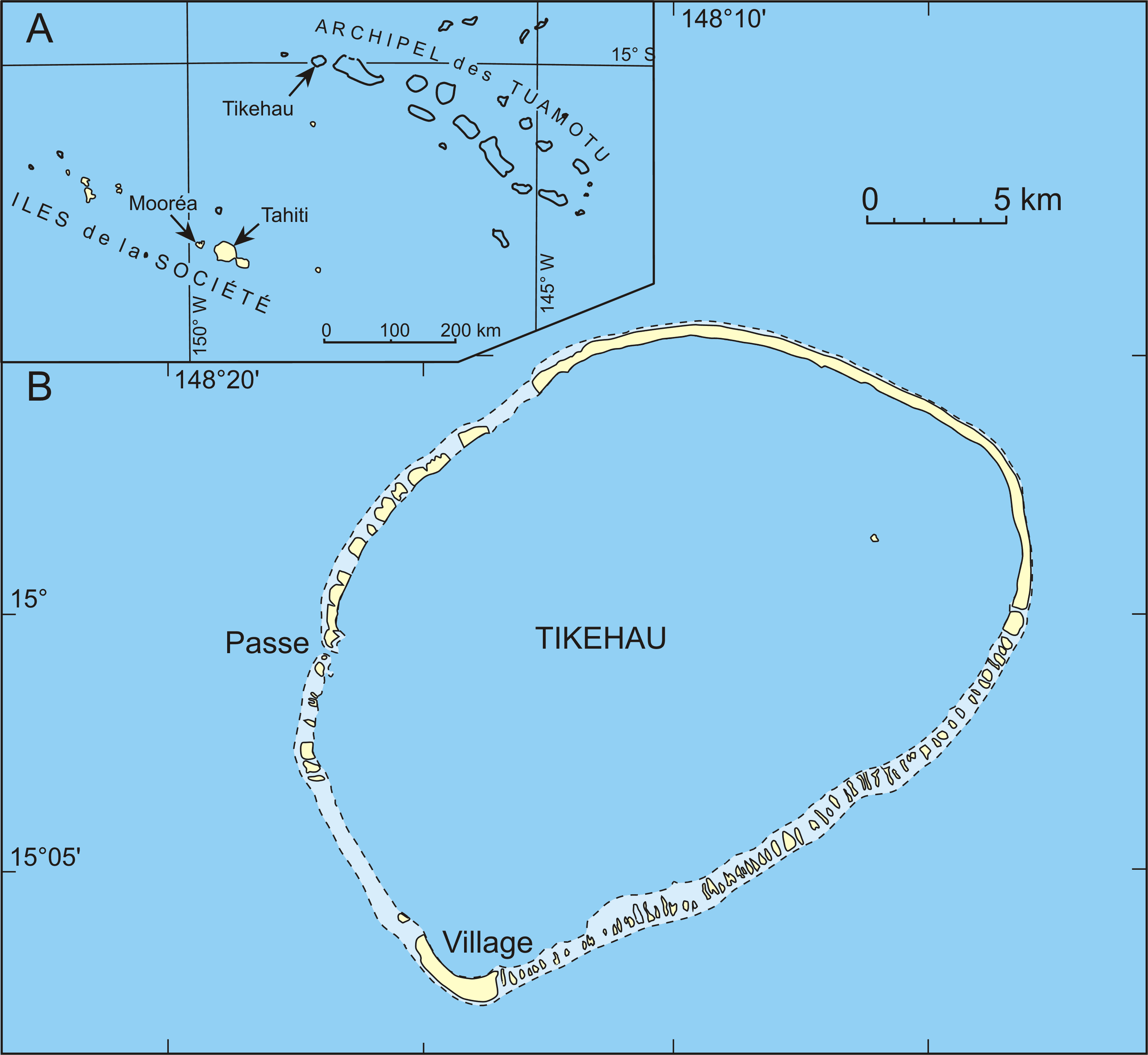 Map of the atoll Tikehau (French Polynesia), Carte de l'atoll Tikehau (Polynésie française), Karte vom Atoll Tikehau (Französisch-Polynesien)